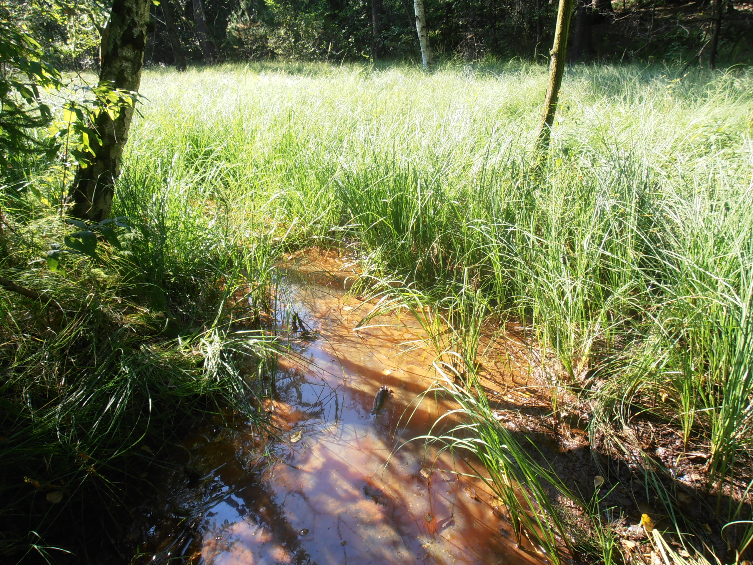 Stechgrund-Quellmoor am Einfluss des Mordgrundbachs